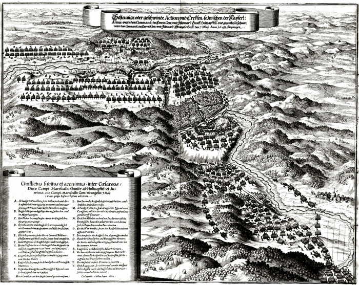 Batalla de Zusmarshausen. Grabado de 1663.